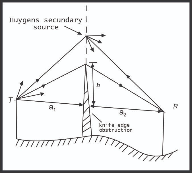 FIgura 1.